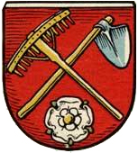 Herb wsi Opawica, gmina Głubczyce.